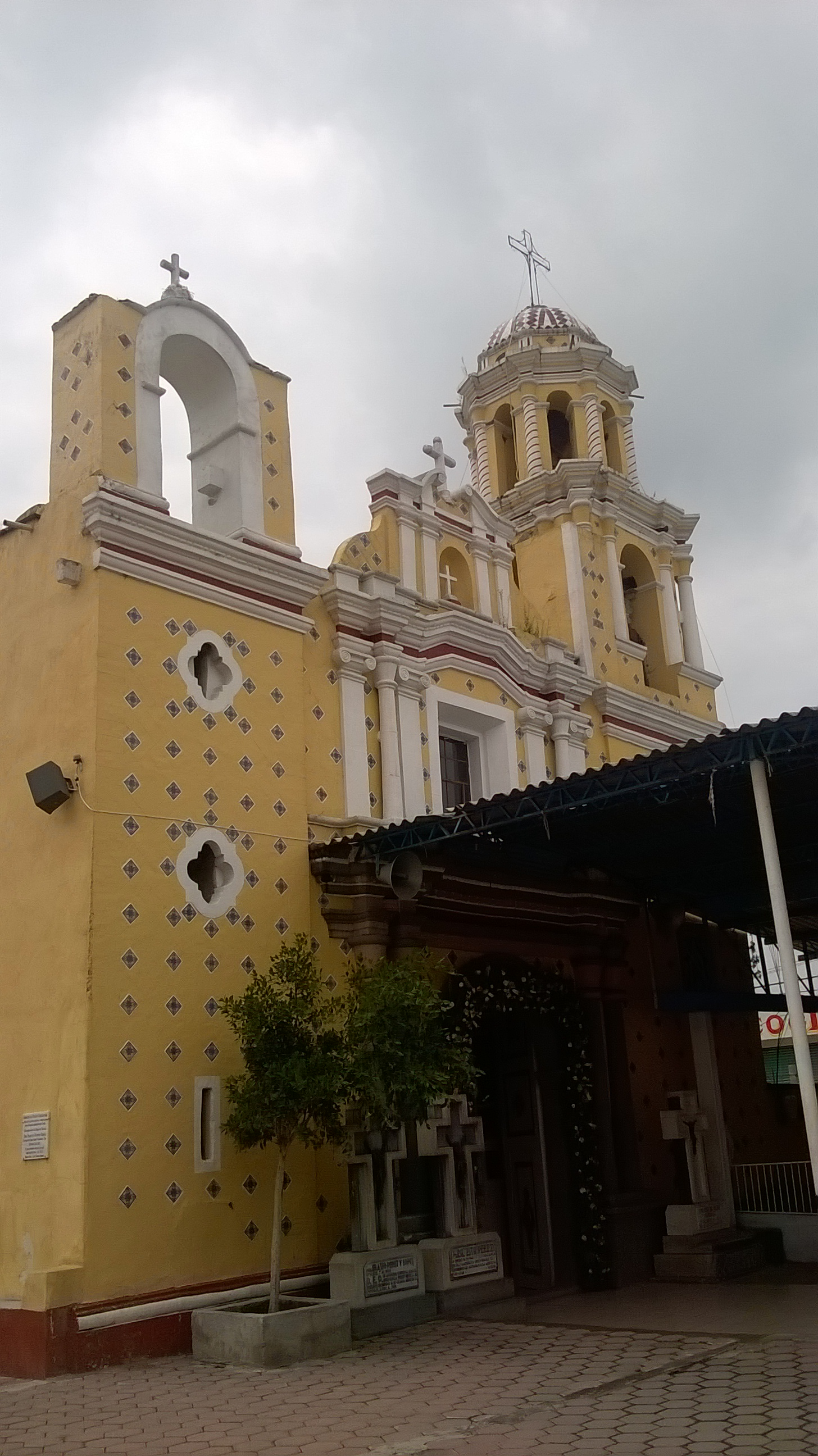 Iglesia de Santa Isabel, Tetlatlahuaca, Tlaxcala